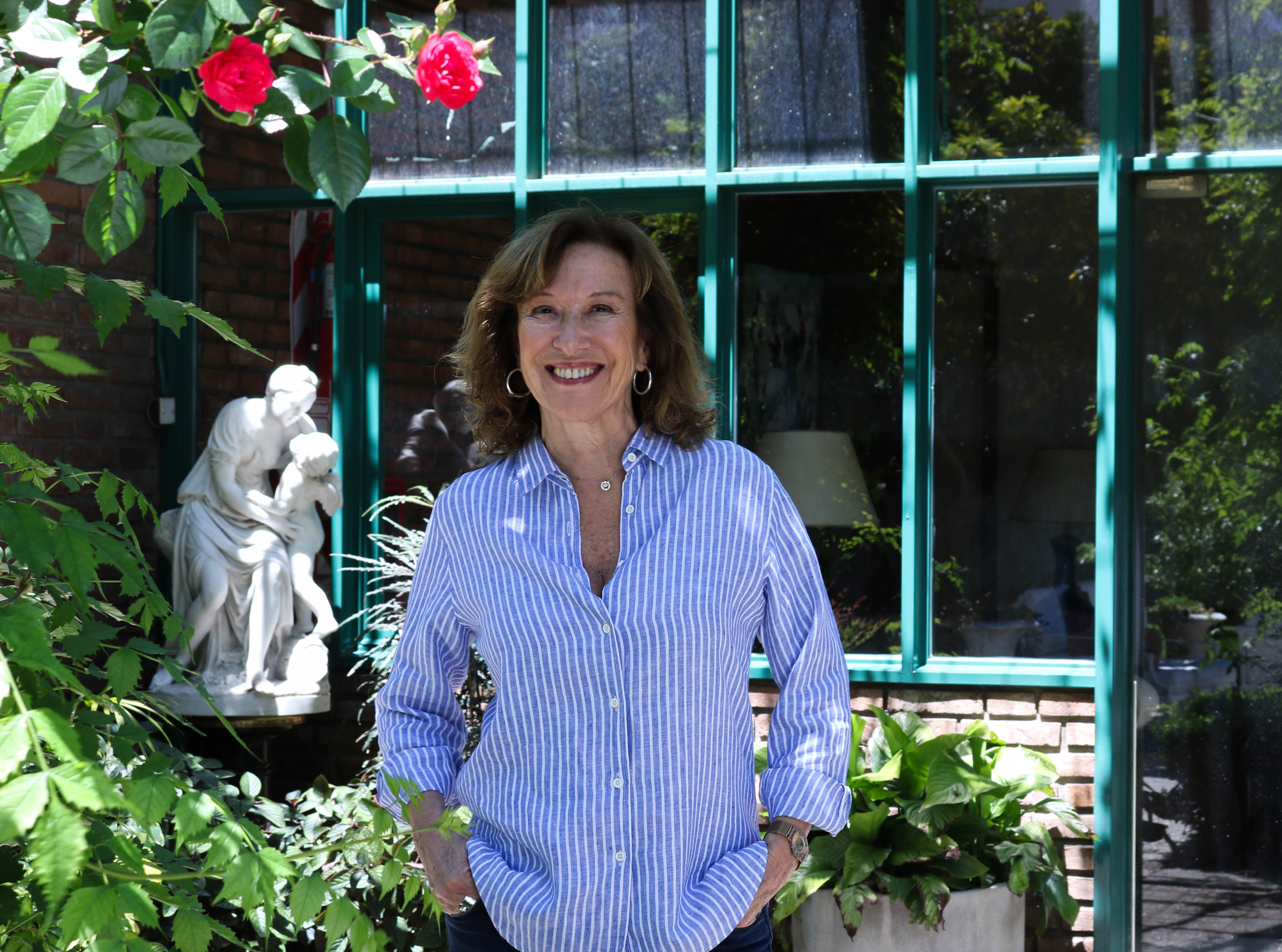 Foto de perfil de Sonia Abadi